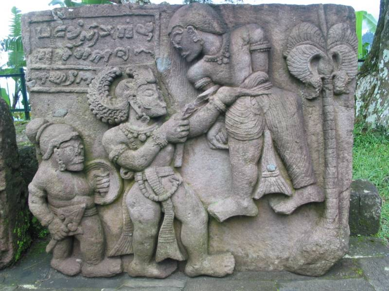 Candi Sukuh